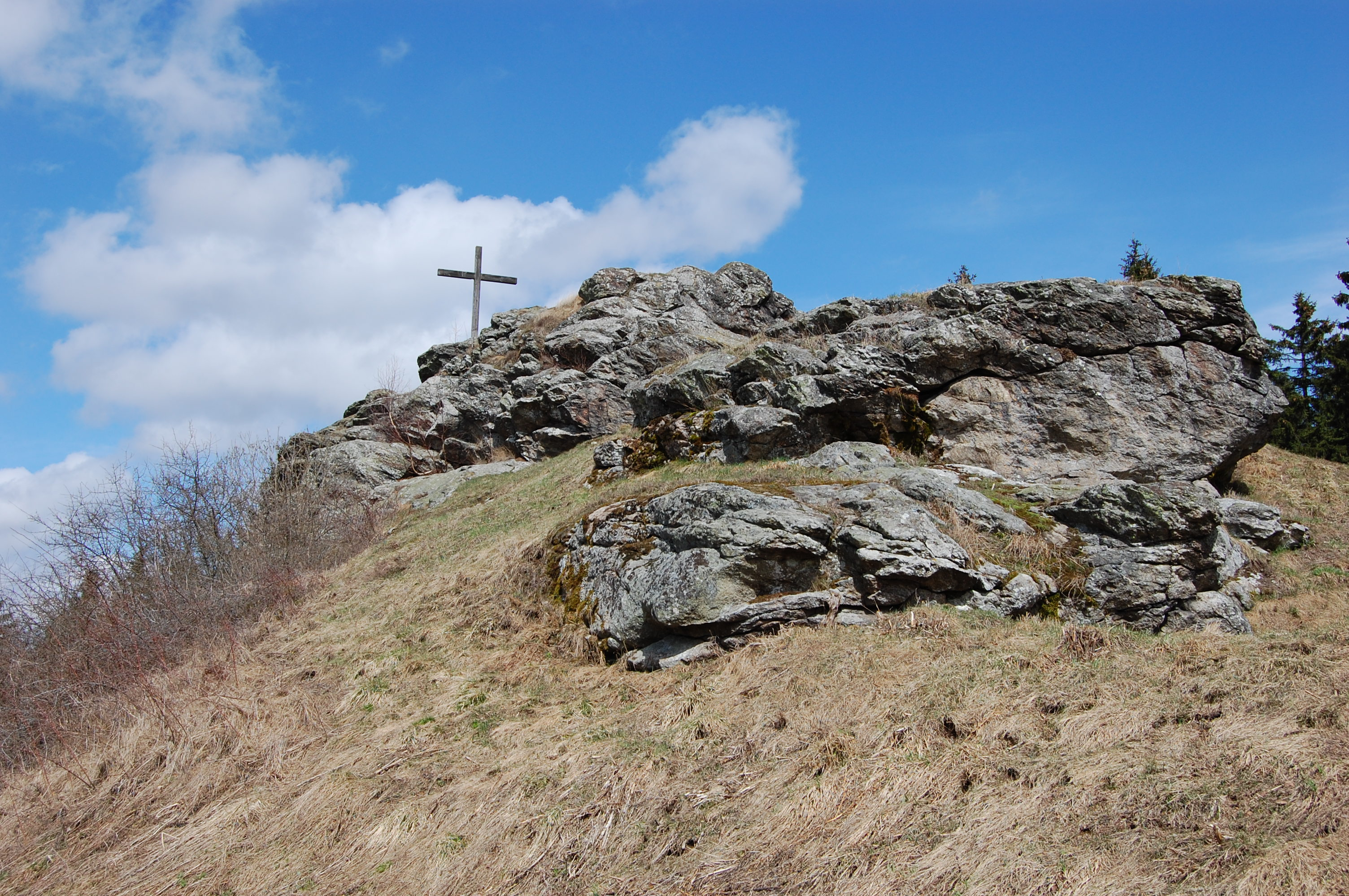 Gipfel Wildstein beim gleichnamigen Ort Wildstein, Gemeinde Teunz, Landkreis Schwandorf